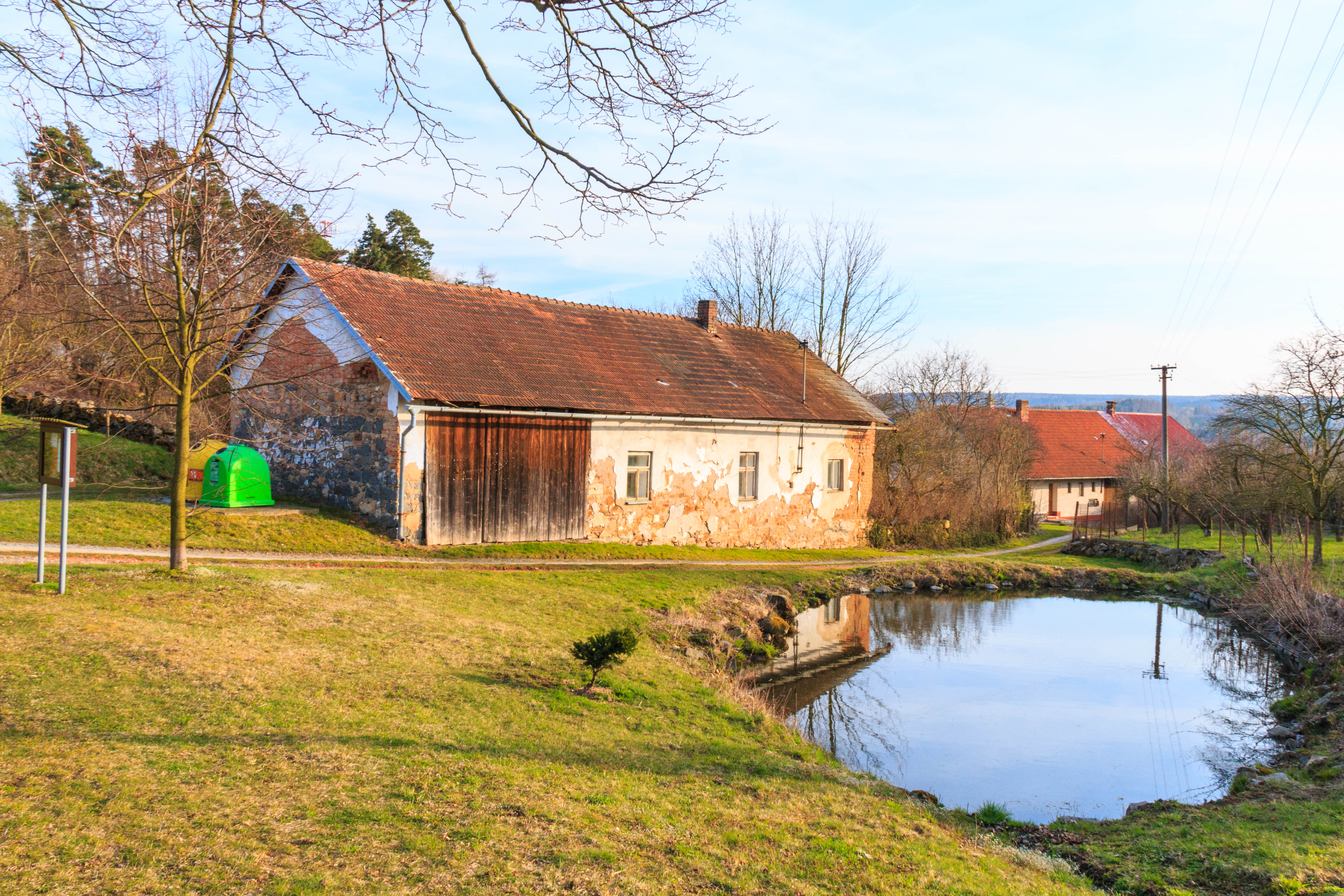 Vrbětice čp. 11